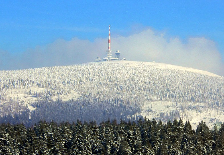 Brocken von Torfhaus aus gesehen, ca. 5 km Luftlinie Foto aufgenommen von Benutzer Axel Hindemith, Februar 2006